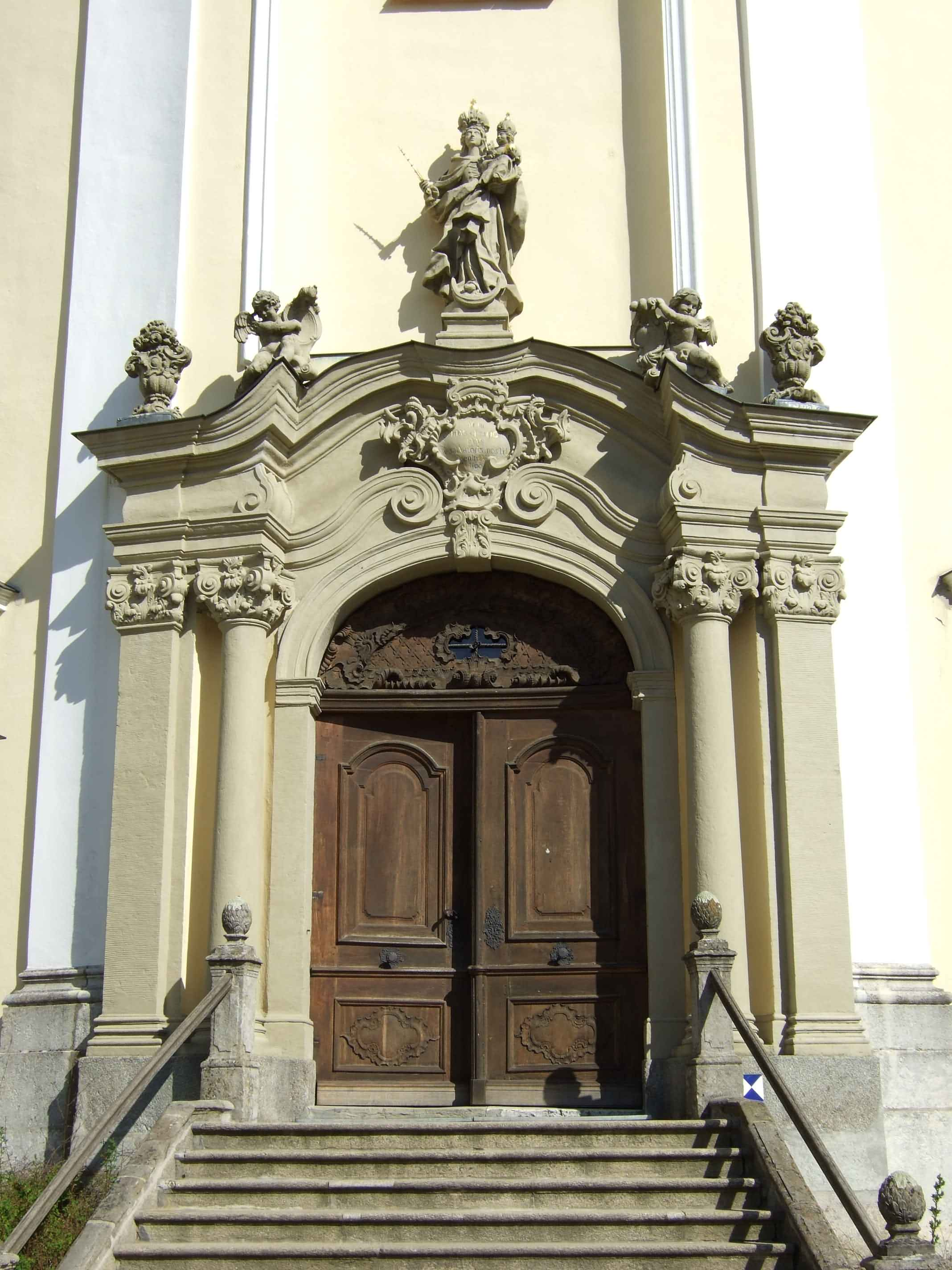 Portal des Benediktinerkirche Frauenzell